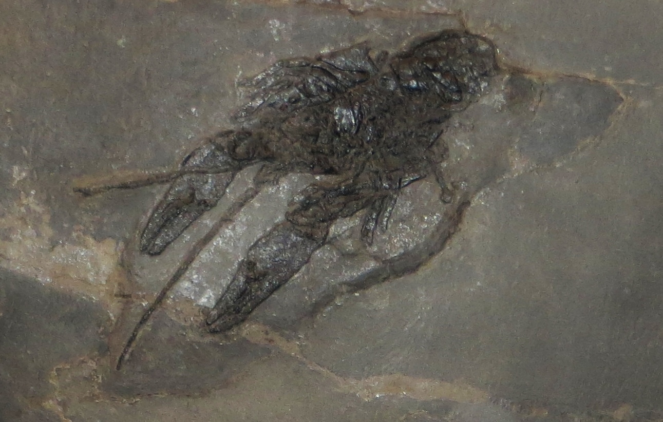 Fossil of Glaessnericaris, an extinct crustacean - Took the picture at Museo di Scienze Naturali, Bergamo